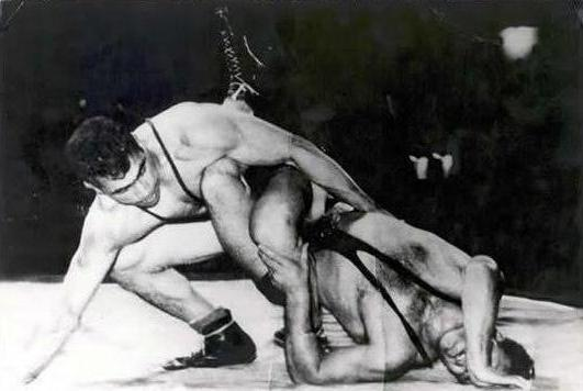 غلامرضا تختی (۵ شهریور ۱۳۰۹ - ۱۷ دی ۱۳۴۶) در حال کشتی گرفتن